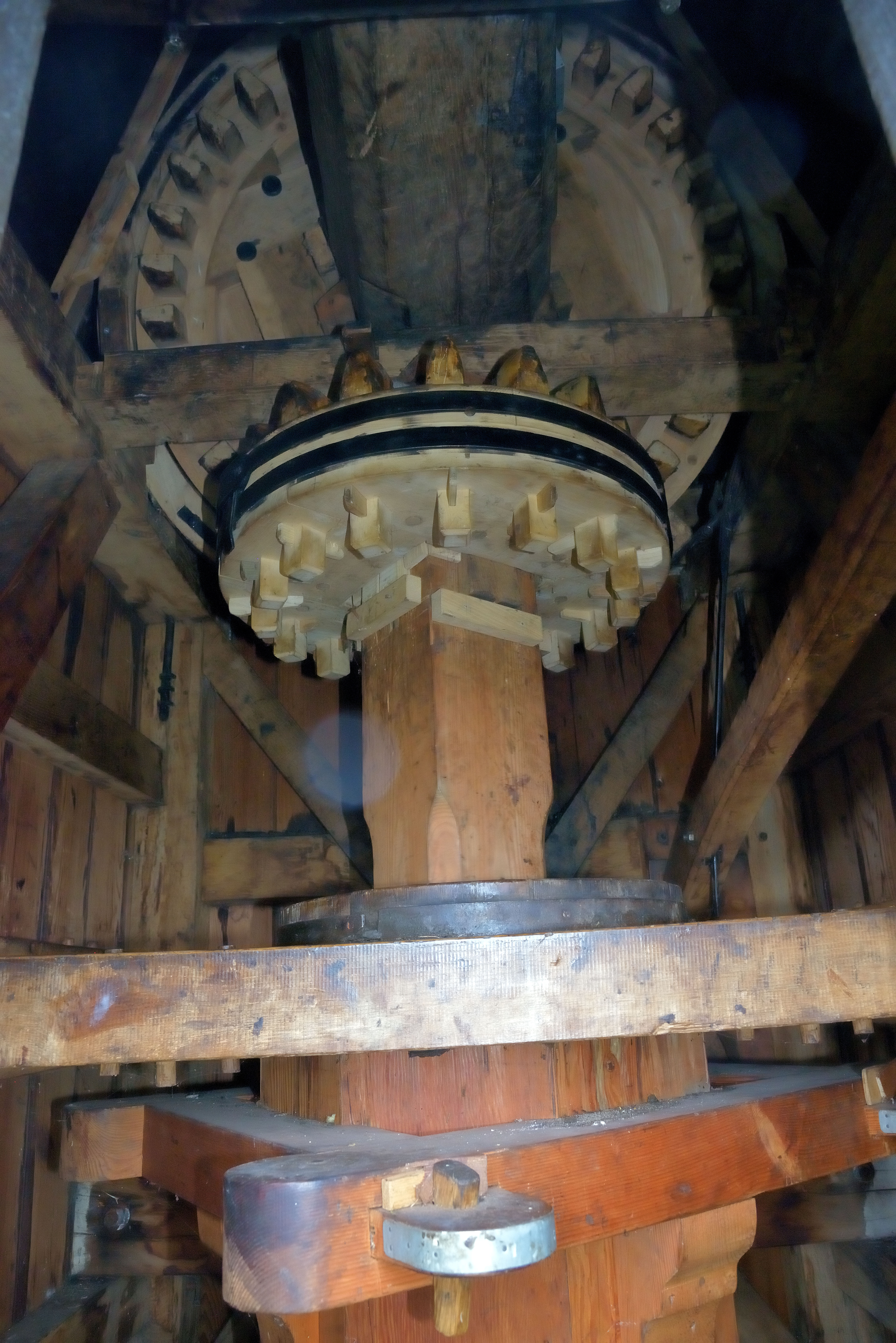 De Wicher, Kalenberg, steenburrie en kokerkraag